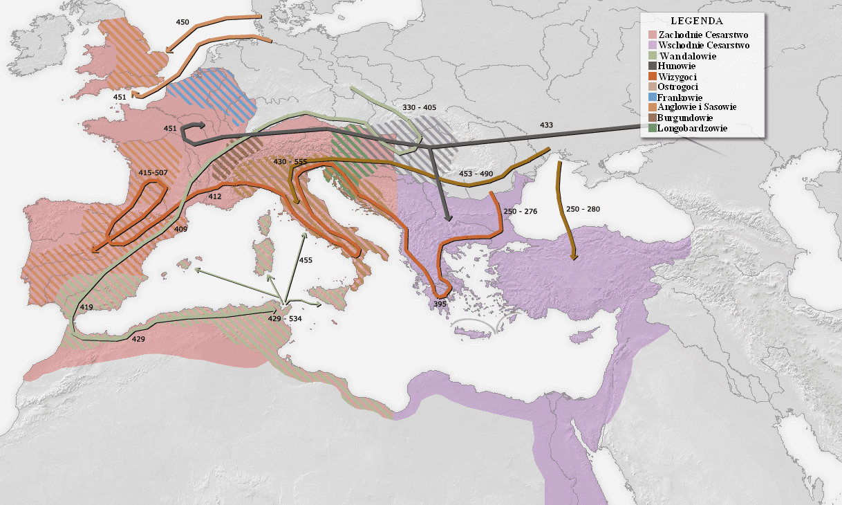 Summary Mapa Europy w czasie wielkiej wędrówki ludów Licensing